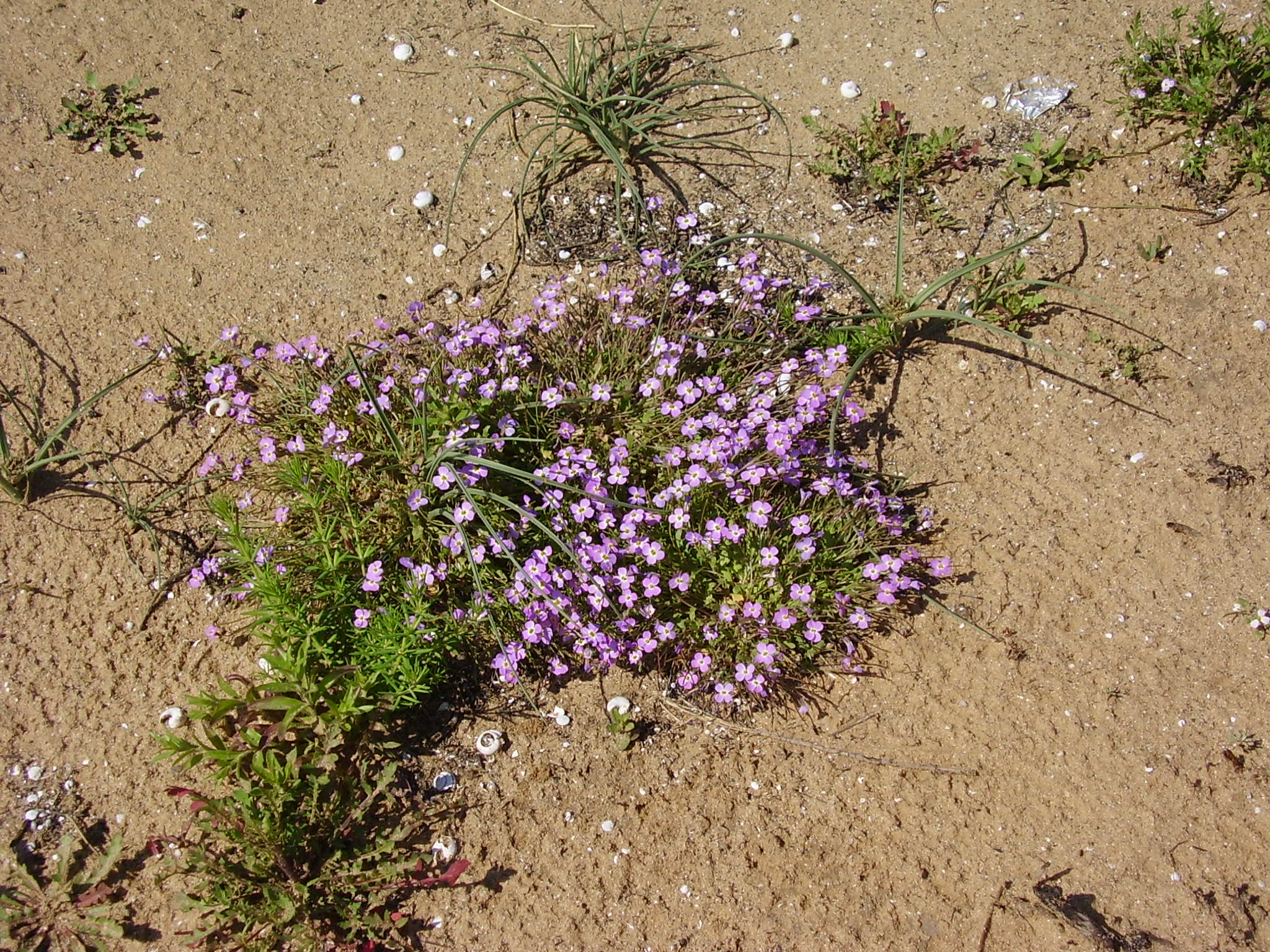 Maresia pulchella, israel